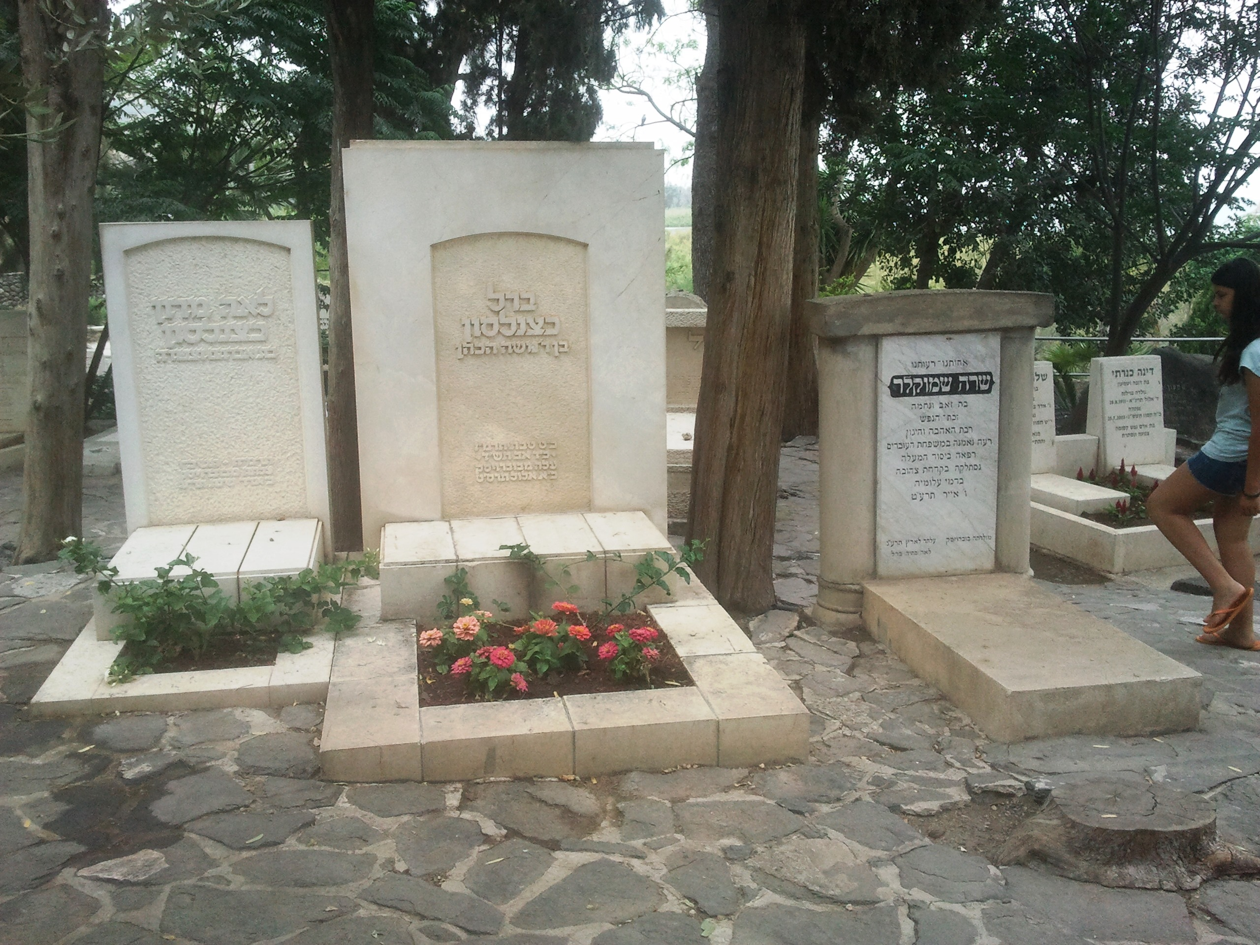 קברו של ברל כצנלסון אשתו ואהובתו שרה שמוקלר